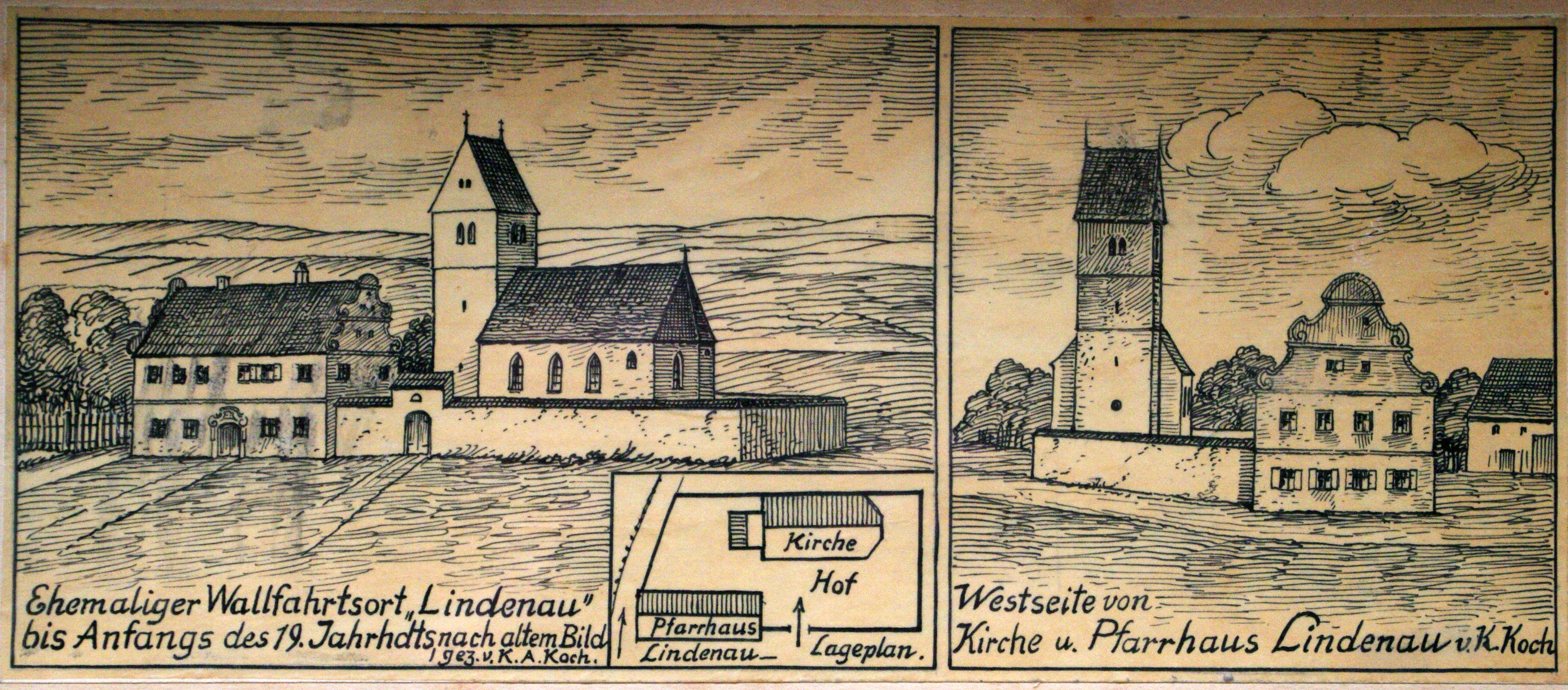 Lithografie von A. Koch aus dem Jahr 1903.Sie zeigt die Anlage des Klosters Lindenau mit Kirche und Hospitium. Die Kirch war zum Zeitpunkt der Zeichnung bereits hundert Jahre abgebrochen, in sofern kann das Aussehen nur aus Überlieferungen stammen. Die Lithografie befindet sich im Heimatmuseum Langenau.